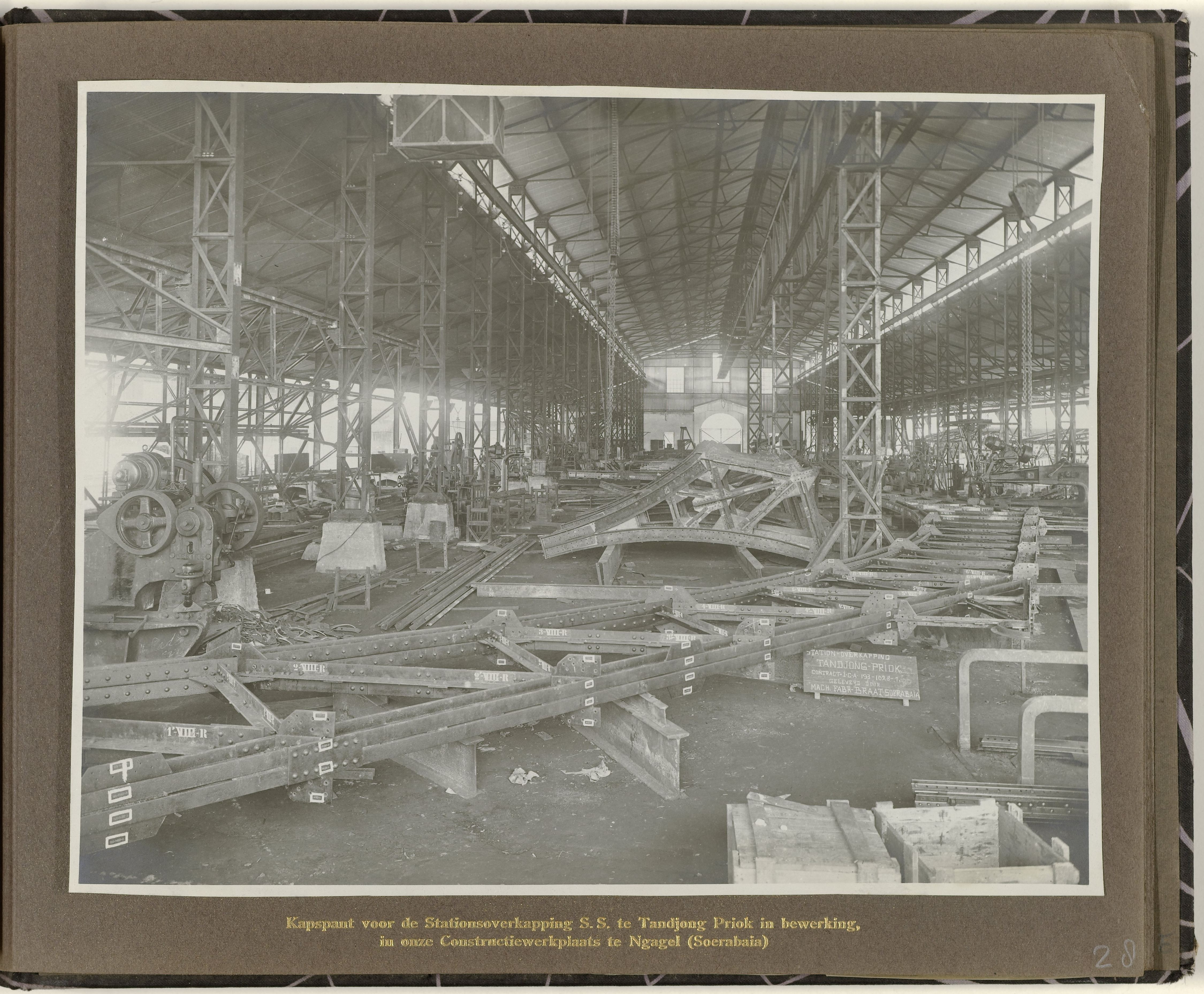 IdentificatieTitel(s): Kapspant voor de Stationsoverkapping S.S. te Tandjong Priok in bewerking, in onze Constructiewerkplaats te Ngagel (Soerabaia) (titel op object)Objecttype: albumblad foto Objectnummer: NG-2002-84-E-28Omschrijving: Albumblad met een foto van een kapspant voor een stationsoverkapping voor het treinstation te Tandjong Priok, tijdens de constructie in de werkplaats te Soerabaja. Onderdeel van het fotoalbum Machinefabriek Braat Soerabaia-Djocja-Tegal, ca. 1916-1924.VervaardigingVervaardiger: fotograaf: anoniemPlaats vervaardiging: SoerabajaDatering: 1916 - 1924Fysieke kenmerken: ontwikkelgelatinezilverdrukMateriaal: albumblad: karton foto: fotopapier Techniek: ontwikkelgelatinezilverdrukAfmetingen: foto: h 205 mm × b 261 mmalbumblad: h 240 mm × b 290 mmOnderwerpWat: station; shelter (railway, tramway)Wanneer: 1916 - 1924Waar: JavaTandjong PriokWie: N.V. Machinefabriek BraatMaatschappij tot Exploitatie van StaatsspoorwegenVerwerving en rechtenVerwerving: aankoop 21-mei-2002Copyright: Publiek domein